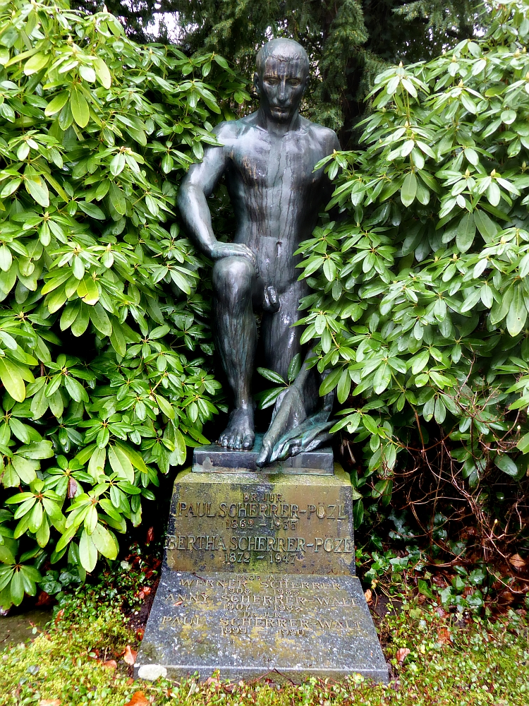 Paul Scherrer-Pözl (1862–1935) Dr.jur., Anwalt, Notar, Politiker, Familiengrab auf dem Friedhof Hörnli, Skulptur von Bildhauer August Suter (1887–1965)